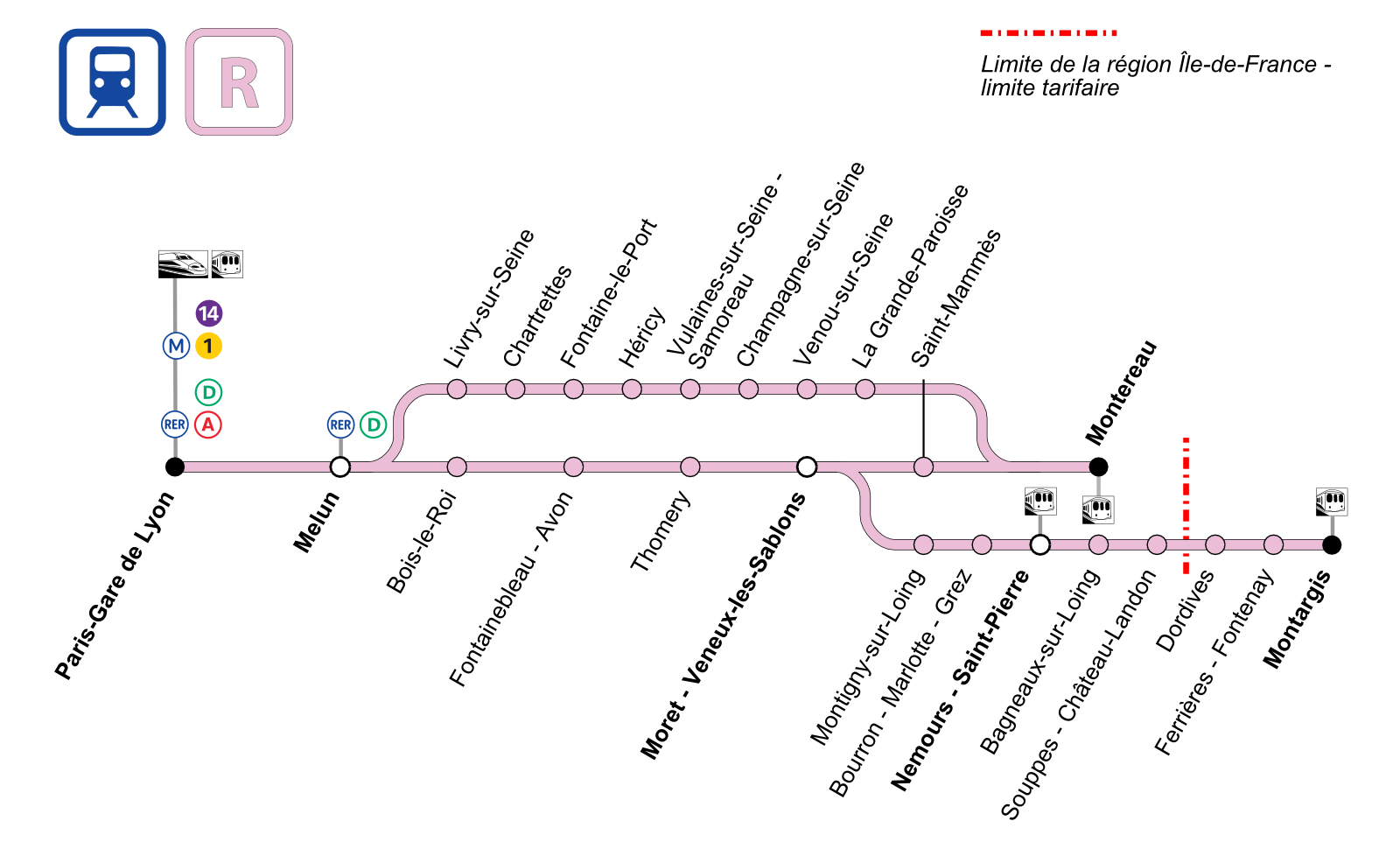 Plan schématique de la ligne R du Transilien avec indication des correspondances (RER, Transilien, métro, tram, autres trains).